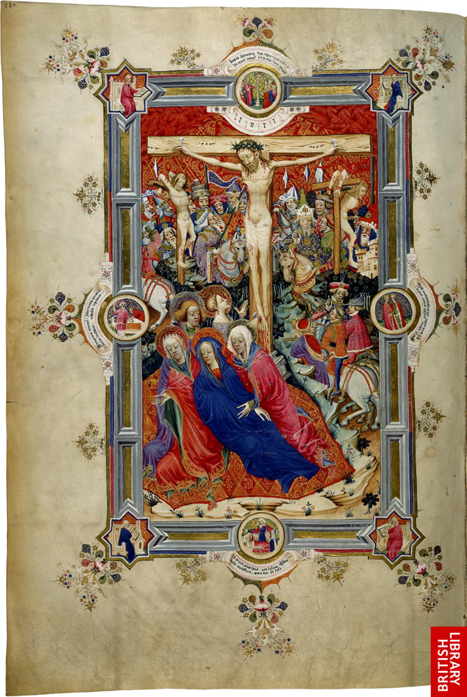 SHERBORNE MISSAL, p 380